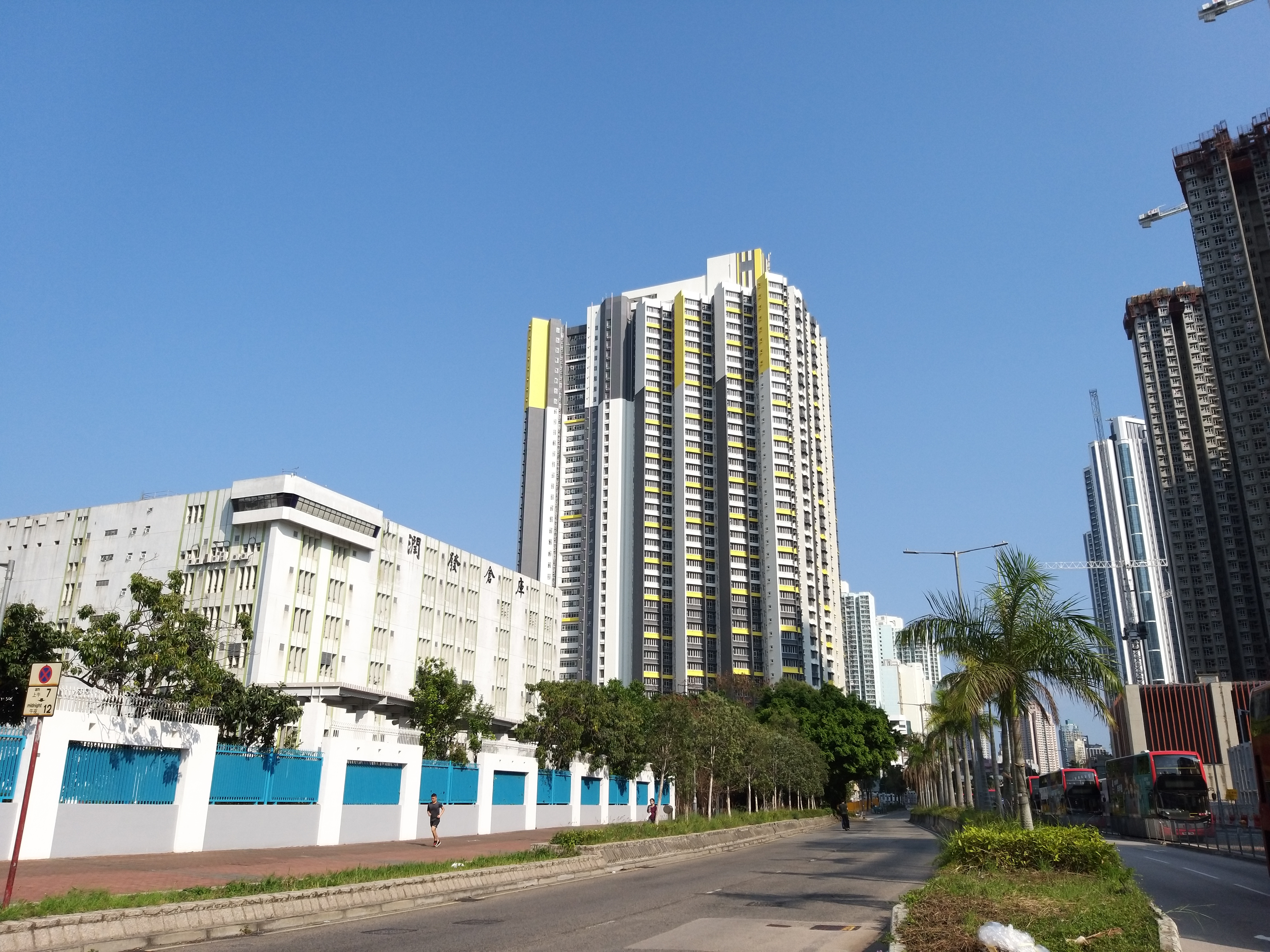 凱德苑氣勢盡現